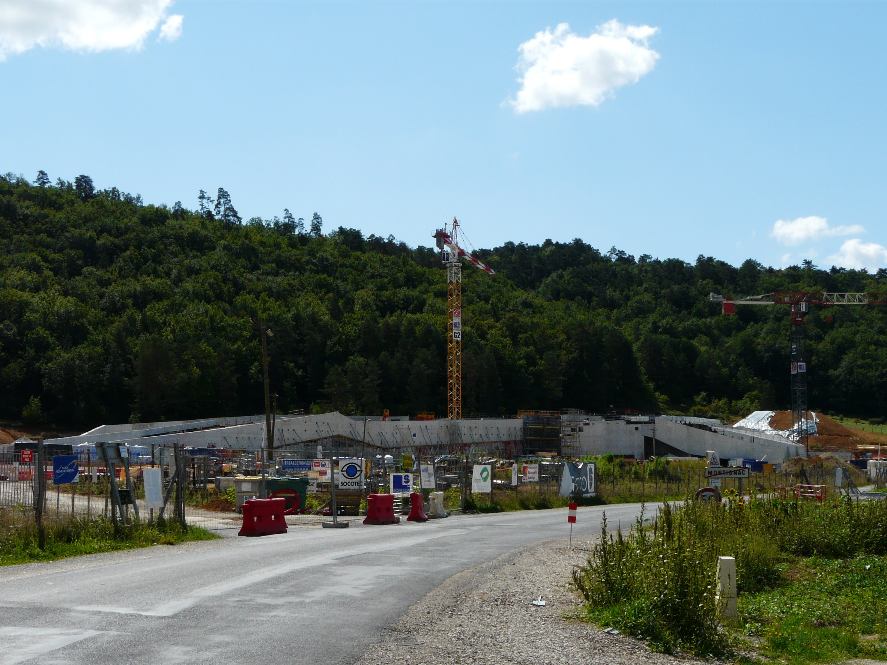 Le chantier de Lascaux 4 à Montignac, Dordogne, France.